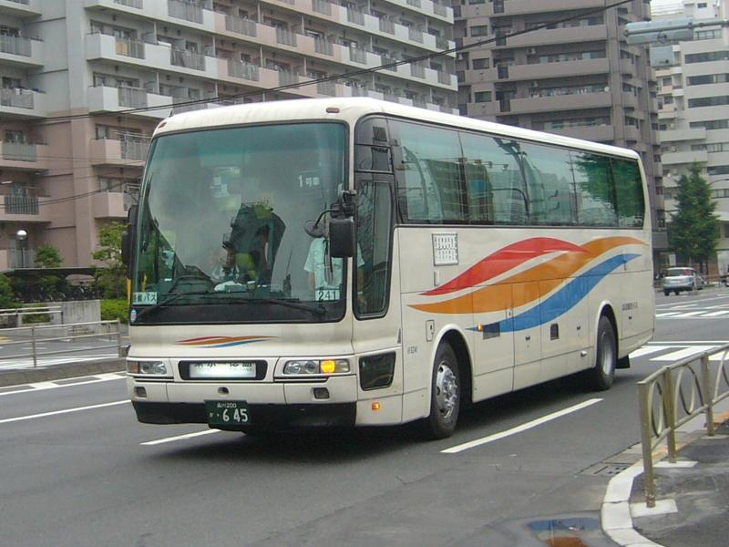 登録番号：品川200か・645 京浜急行バス羽田営業所所属 car no.6241 2005年に京急観光バスに移管されるが2008年に同社清算に伴い出戻り 高速用車両（各系統で共通運用） 三菱ふそう・エアロクィーン PJ-MS86JP